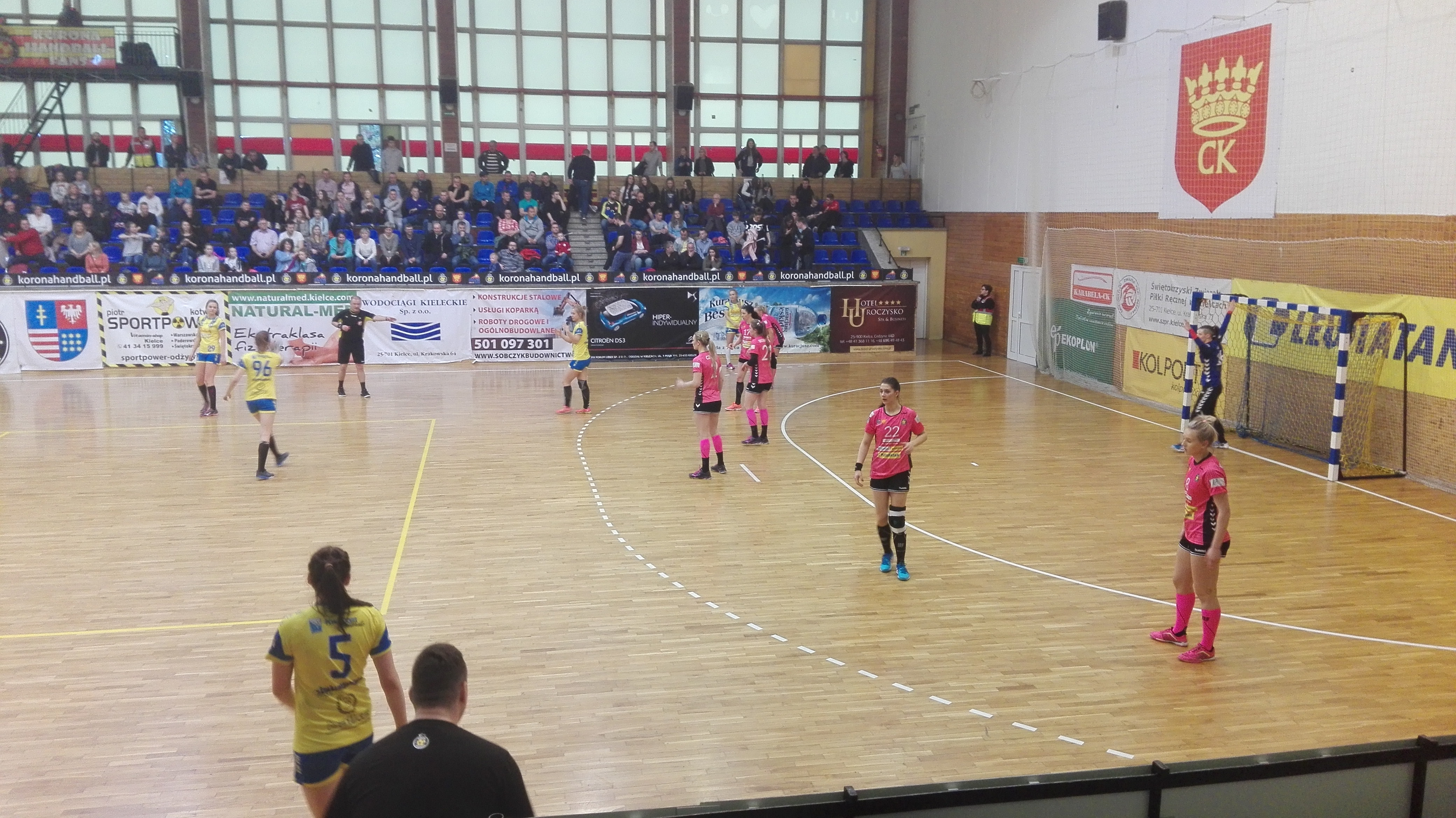 Mecz I ligi kobiet: Korona Handball - MTS Kwidzyn, 29 kwietnia 2017 r. (32:24).